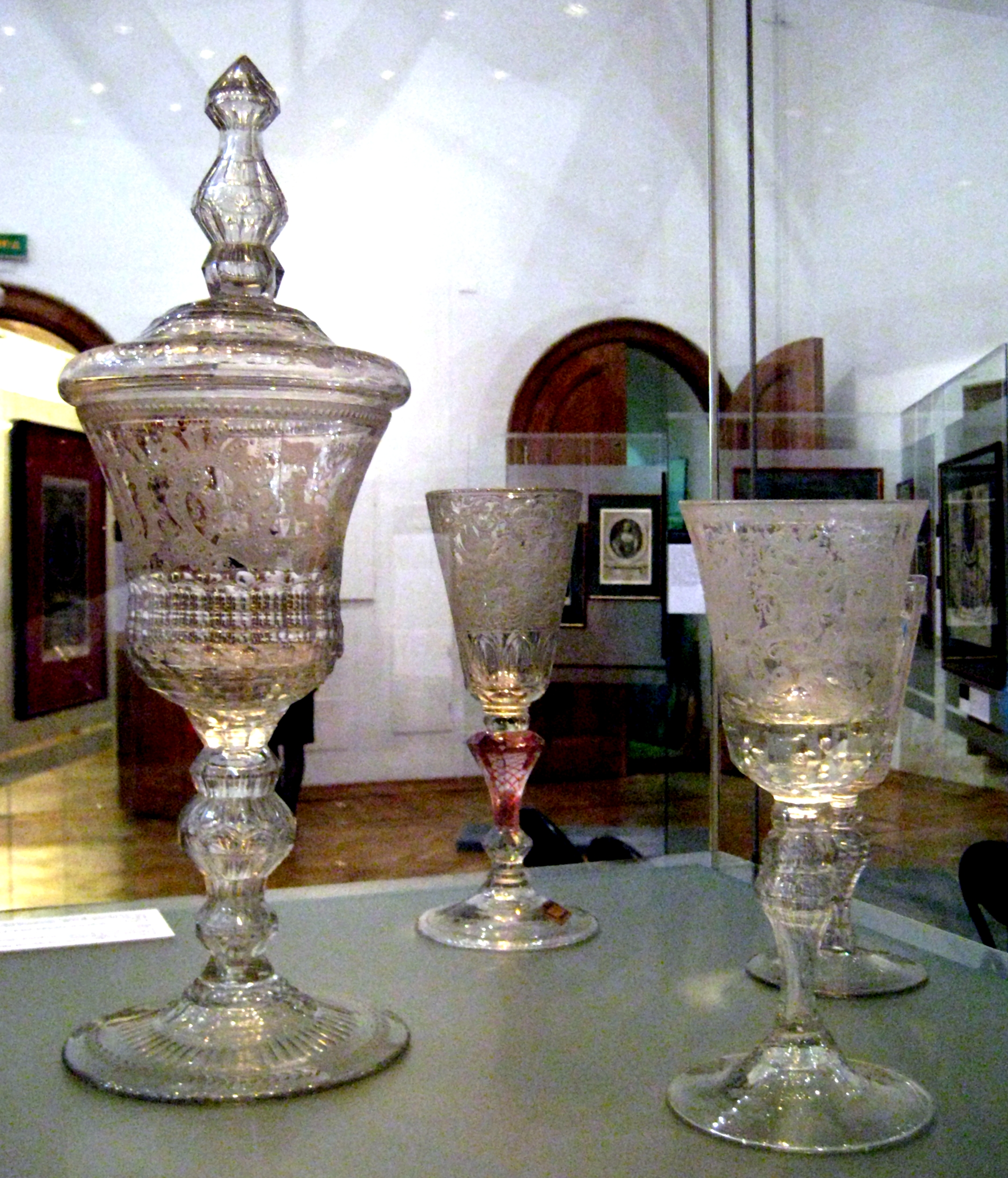 Кубок с крышкой с поясным профильным портретом императрицы Елизаветы Петровны. Богмия (?). Сер. 18 века. 2-й - с профильным портретом Екатерины, 1770-е.